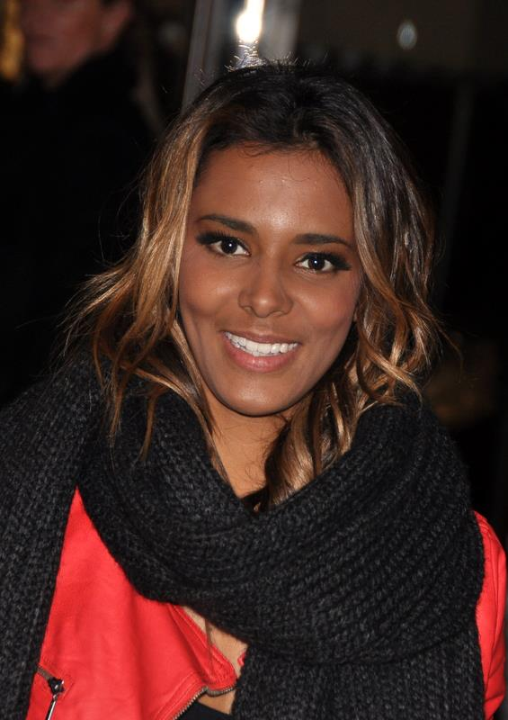 Shy'm aux NRJ Music Awards